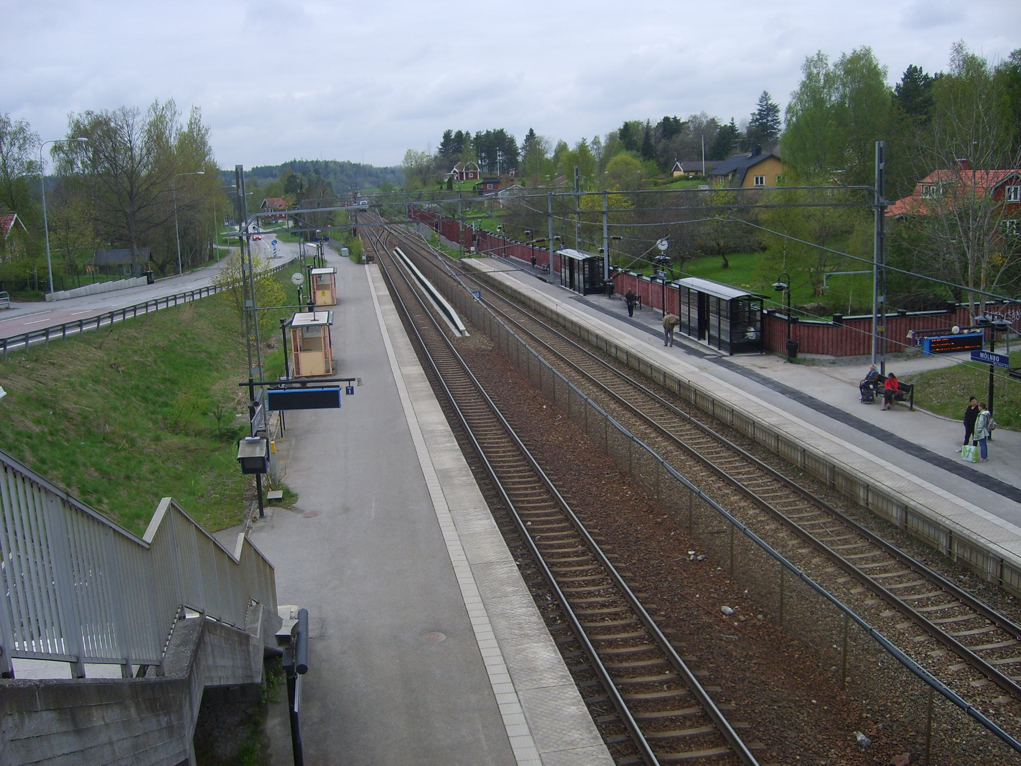 Train station in Mölnbo outside Södertälje in Sweden.